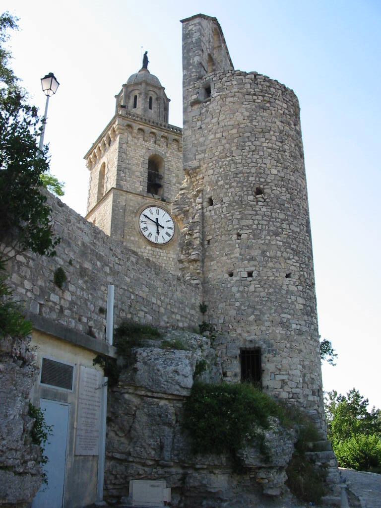 Clocher Saint-Denis de Reillanne